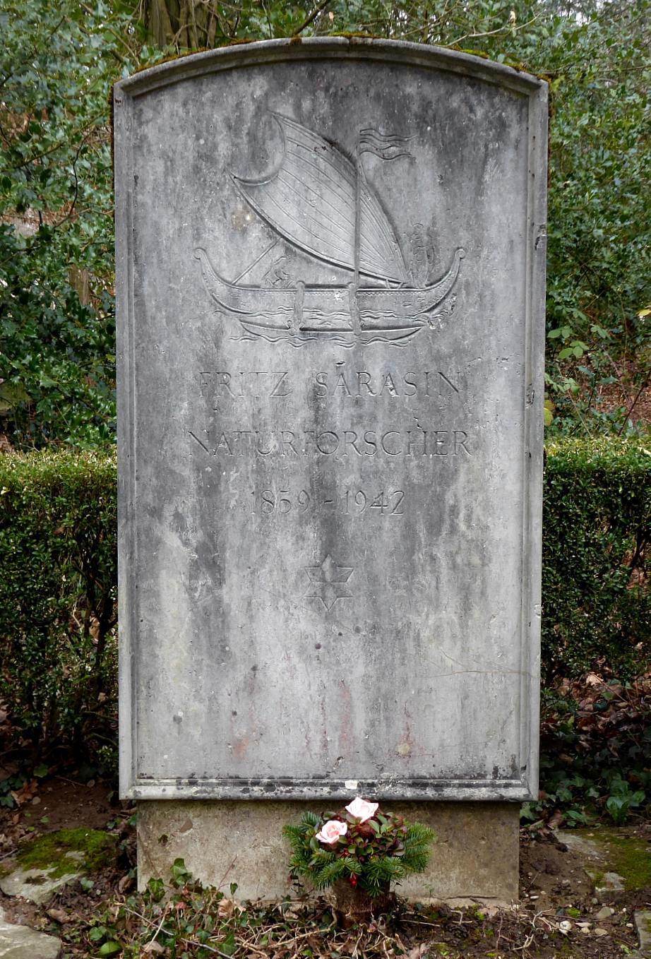 Fritz Sarasin (1859–1942) Naturforscher, Forschungsreisender, Autor, Dr. h.c. der Univ. Basel und Genf, Präsident der Ethnograph. u. der Naturhist. Museumskommission; Grab auf dem Friedhof Hörnli